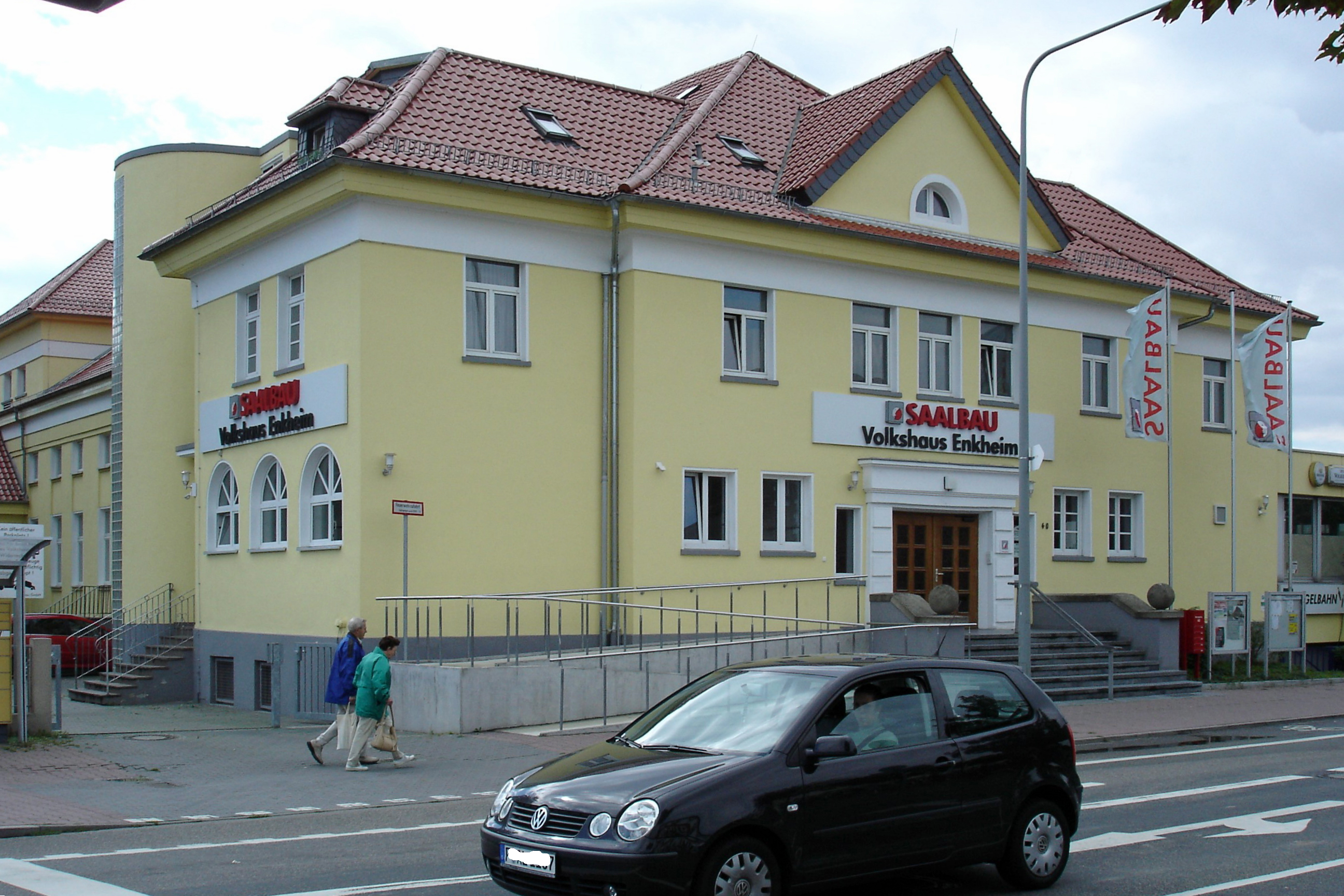 Volkshaus Enkheim, Ffm-Bergen-Enkheim, Borsigallee